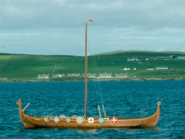 Vikinger-Langboot (Nachbau)